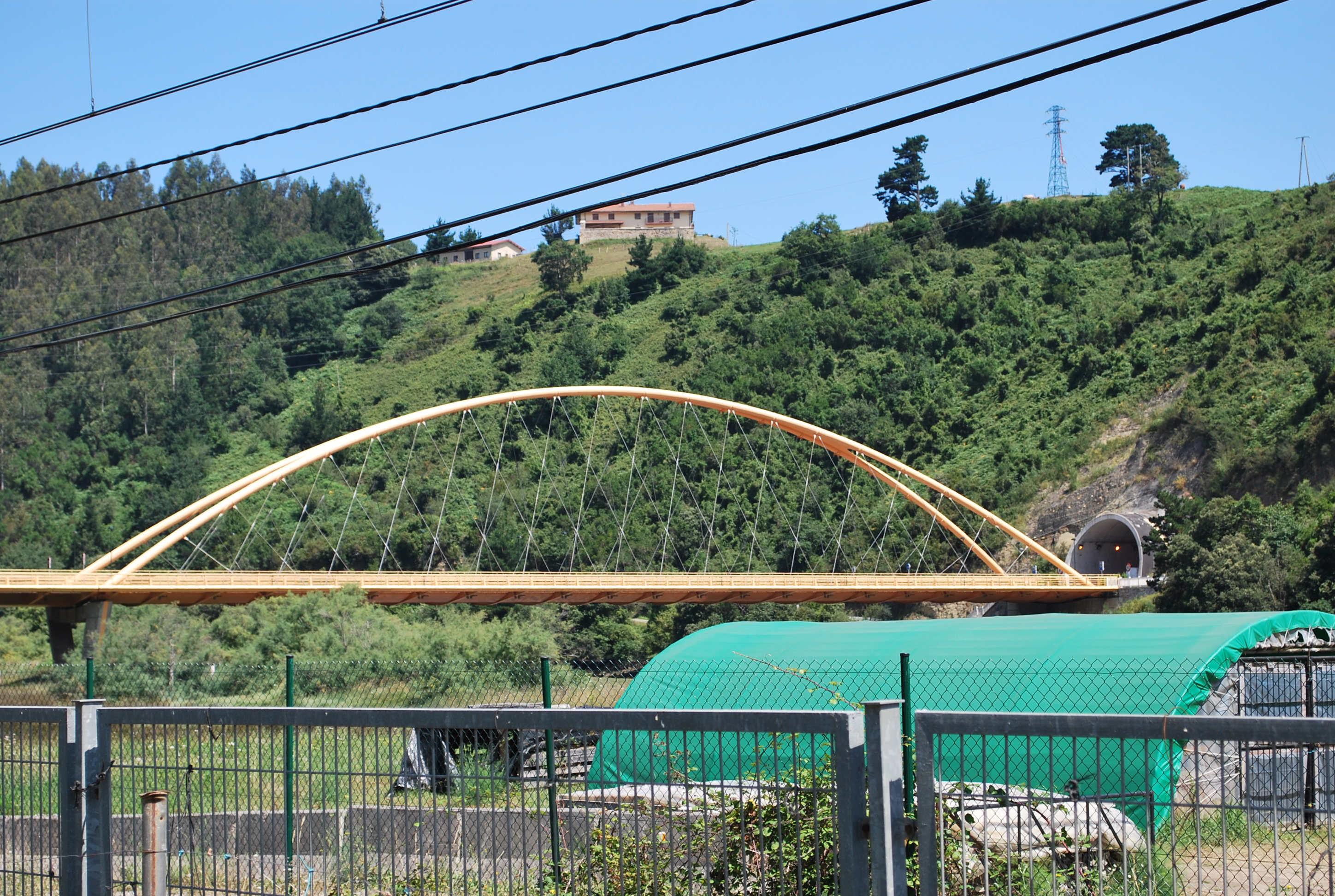 Pont routier sur le rio Deba à Deba (Guipuscoa).